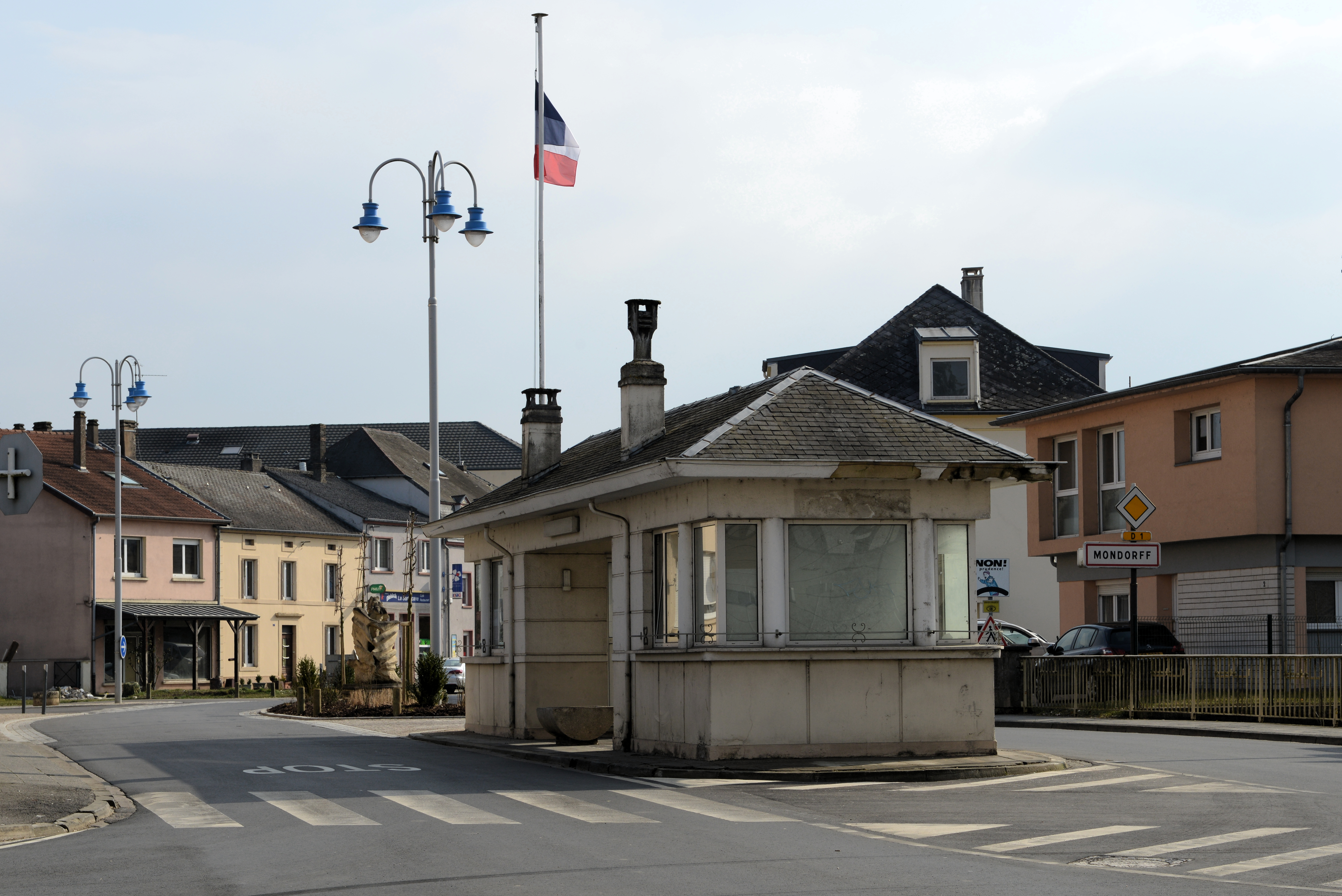 D'Douaneshaischen zu Munneref.